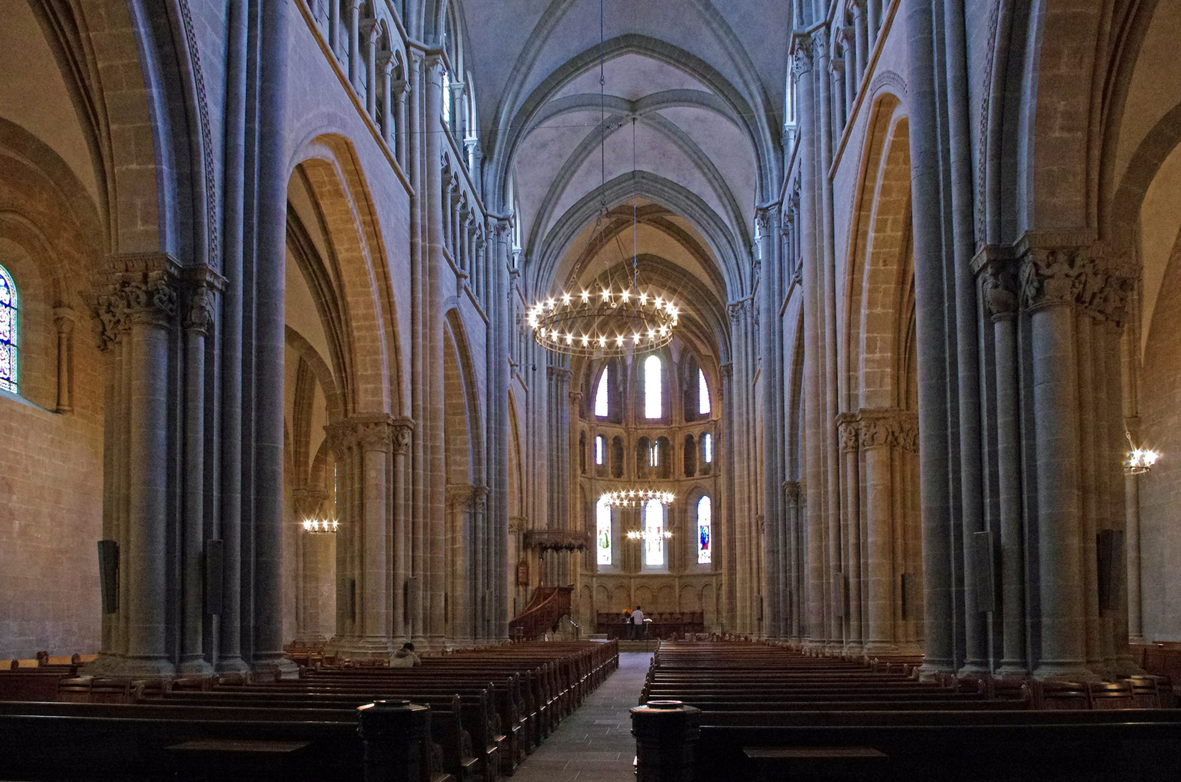 La Cathédrale Saint-Pierre. C'est l'église protestante principale de Genève. La construction commence en 1160 et dure plus d'un siècle. Au XVI ème siècle, la Réforme vide l'édifice de tout ornement. La façade néoclassique date du XVII ème siècle. The Cathedral of St. Peter. This is the main Protestant church in Geneva. Construction begins in 1160 and lasts for more than a century. In the sixteenth century the Reformation the building empty of decoration. The neoclassical facade dates from the seventeenth century.